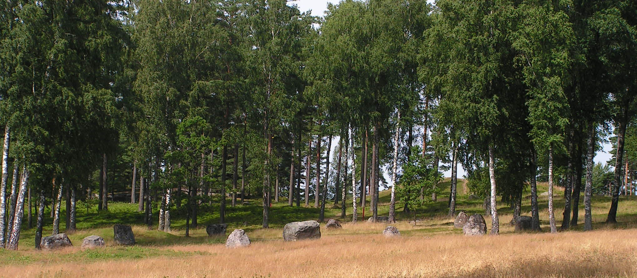 Domarring vid Blomsholm Norr om Strömstad.